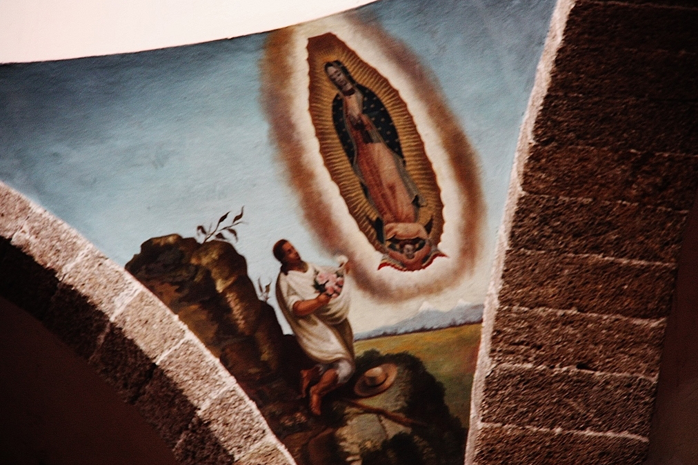 Iglesia Santa María de la Asunción, Tequisquiapan, Estado de Querétaro, México